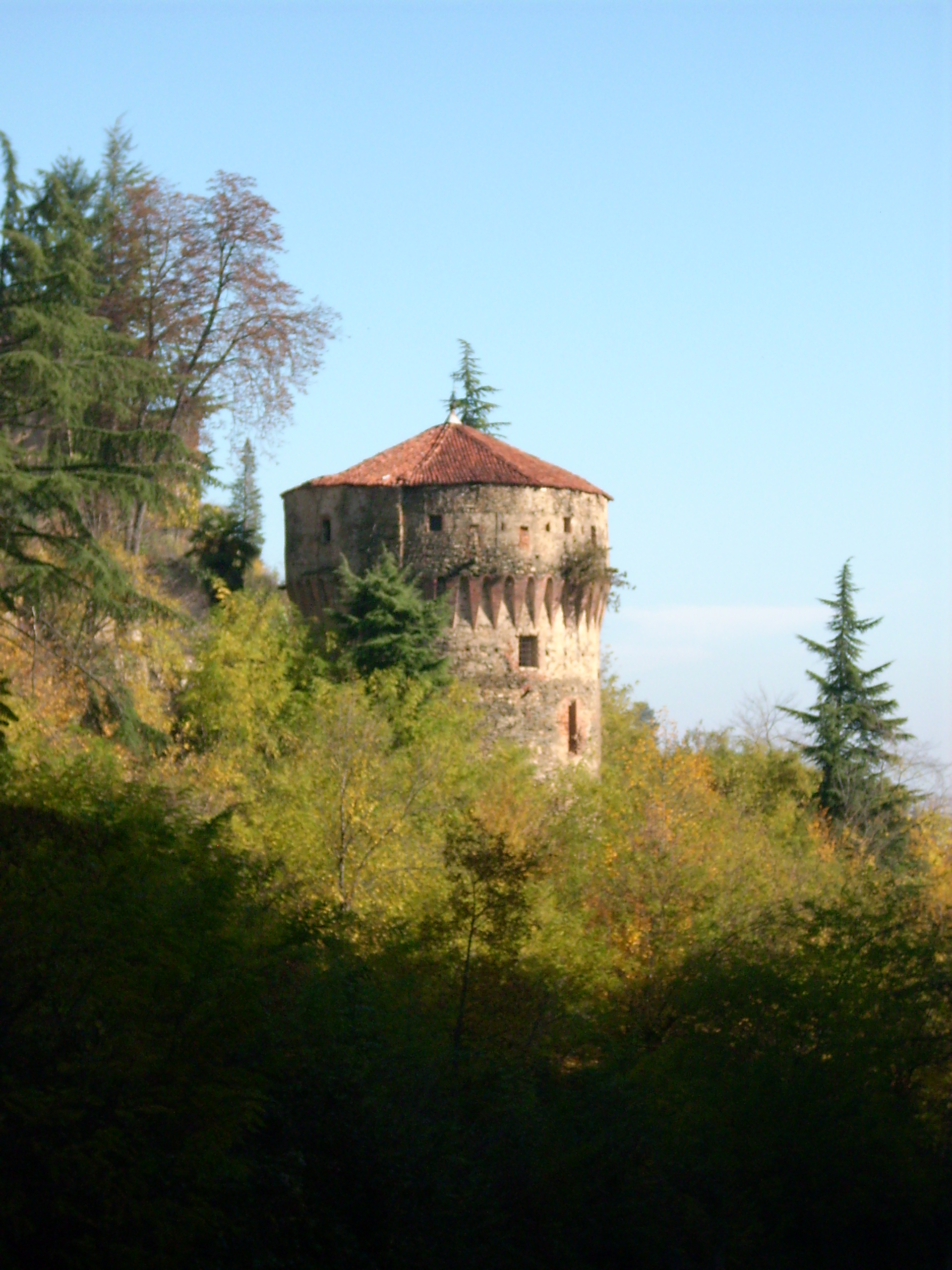 Castello di Verzuolo, Piemonte, Italia